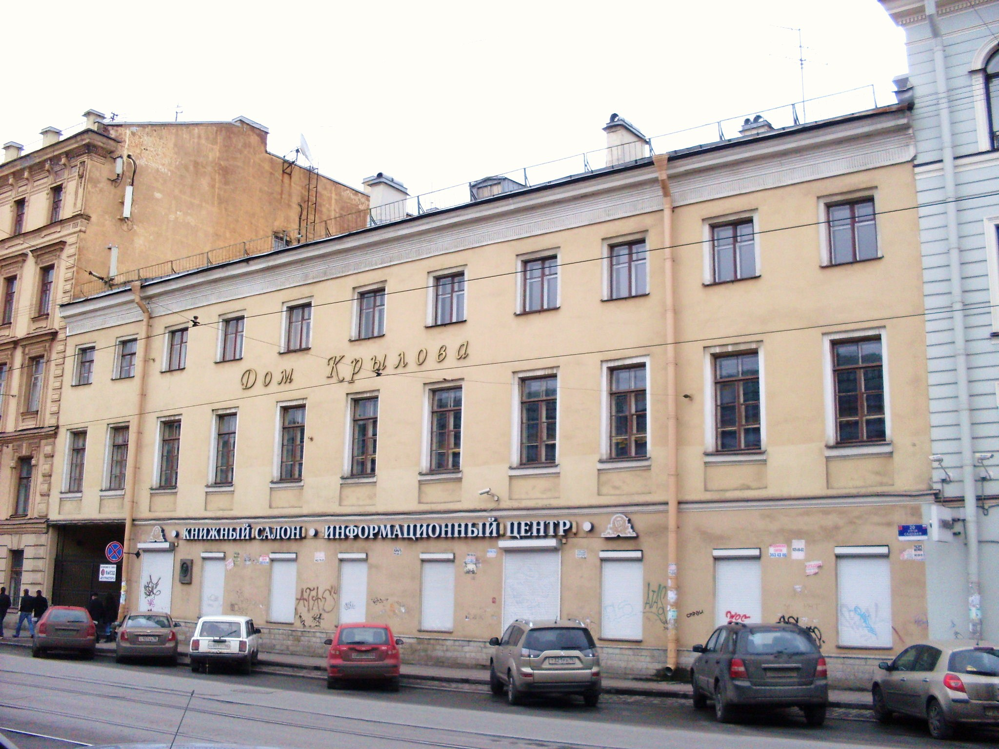 Дом Крылова, Садовая 20, Санкт-Петербург